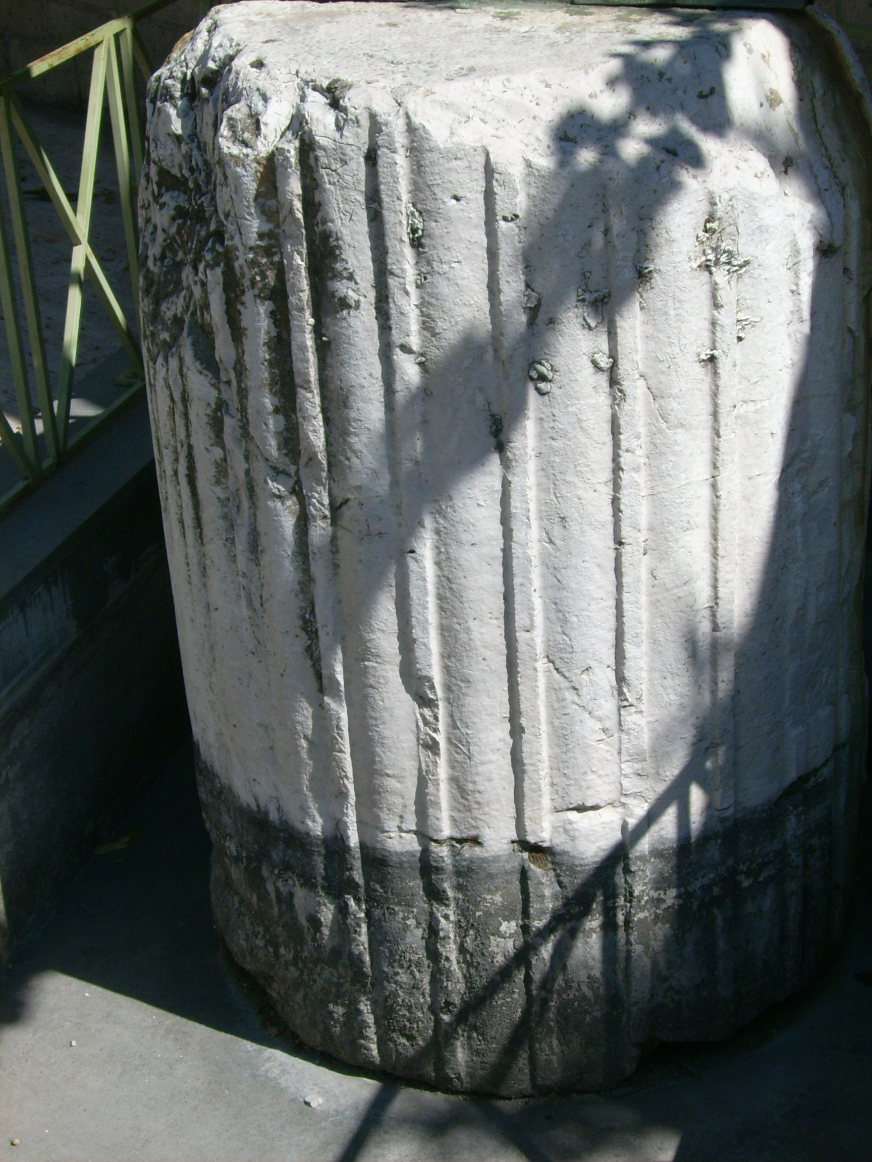 Colonna Romana rinvenuta ad un incrocio